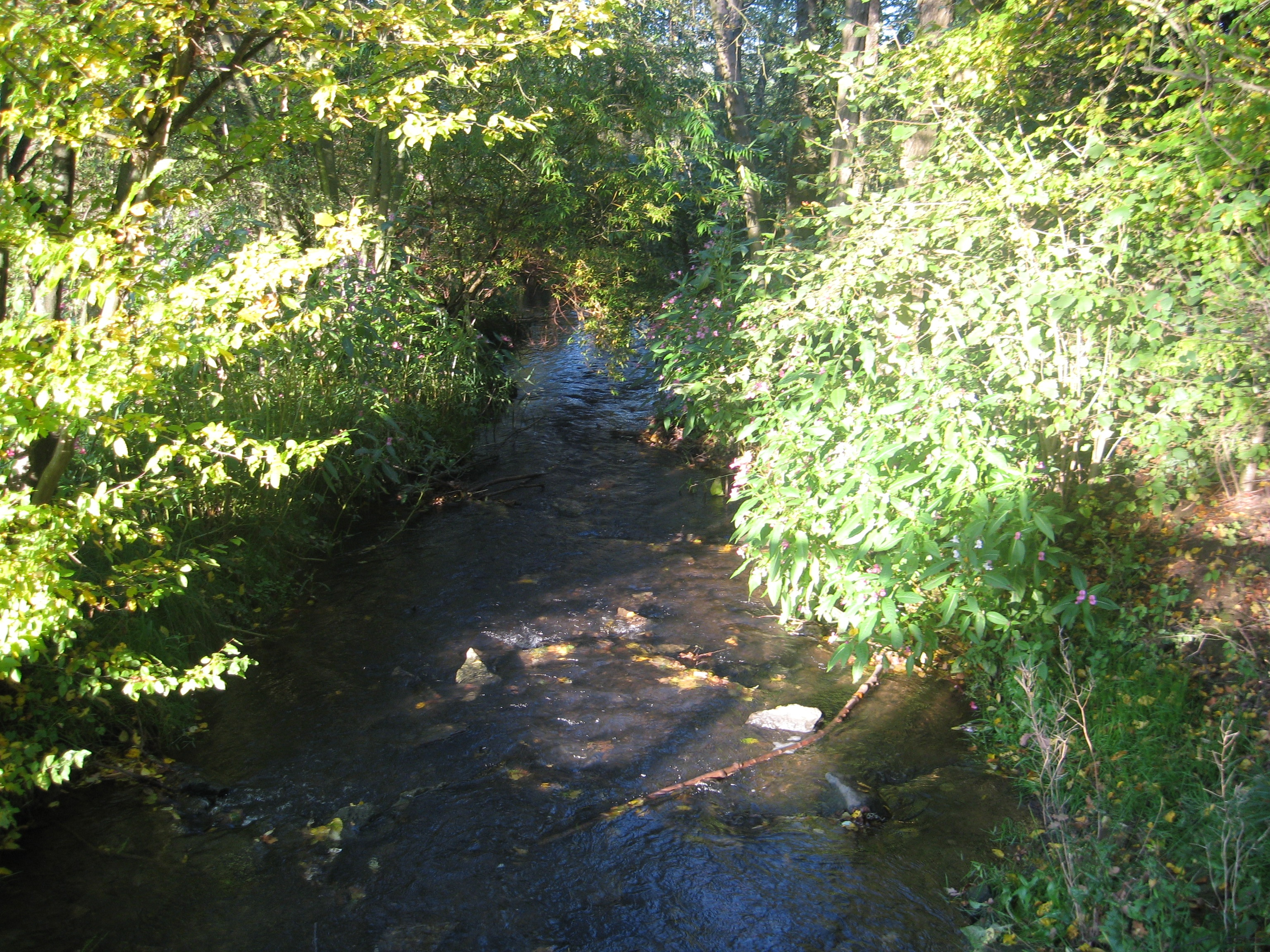 Die Dielfe bei Wilnsdorf-Niederdielfen im Siegerland.